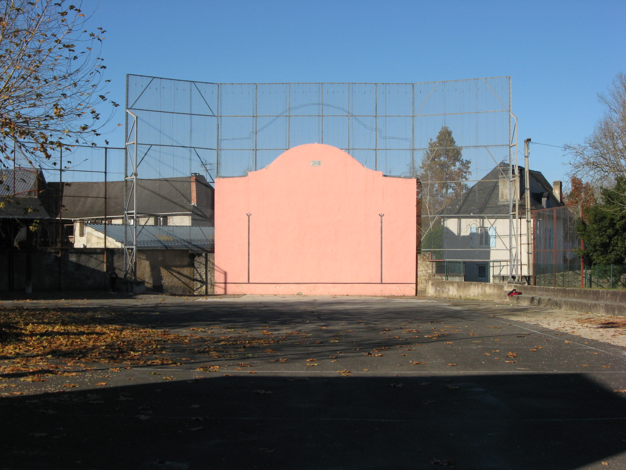 Fronton construit en 1945 d'Ogeu-les-Bains (Pyrénées-Atlantiques) (Pyrénées).